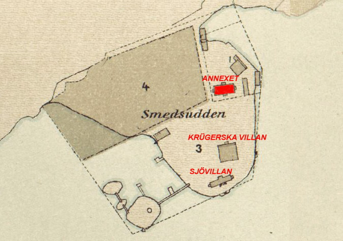 Del av Stockholmskarta visande Smedsudden. Annexet är den enda bevarade byggnaden på udden.